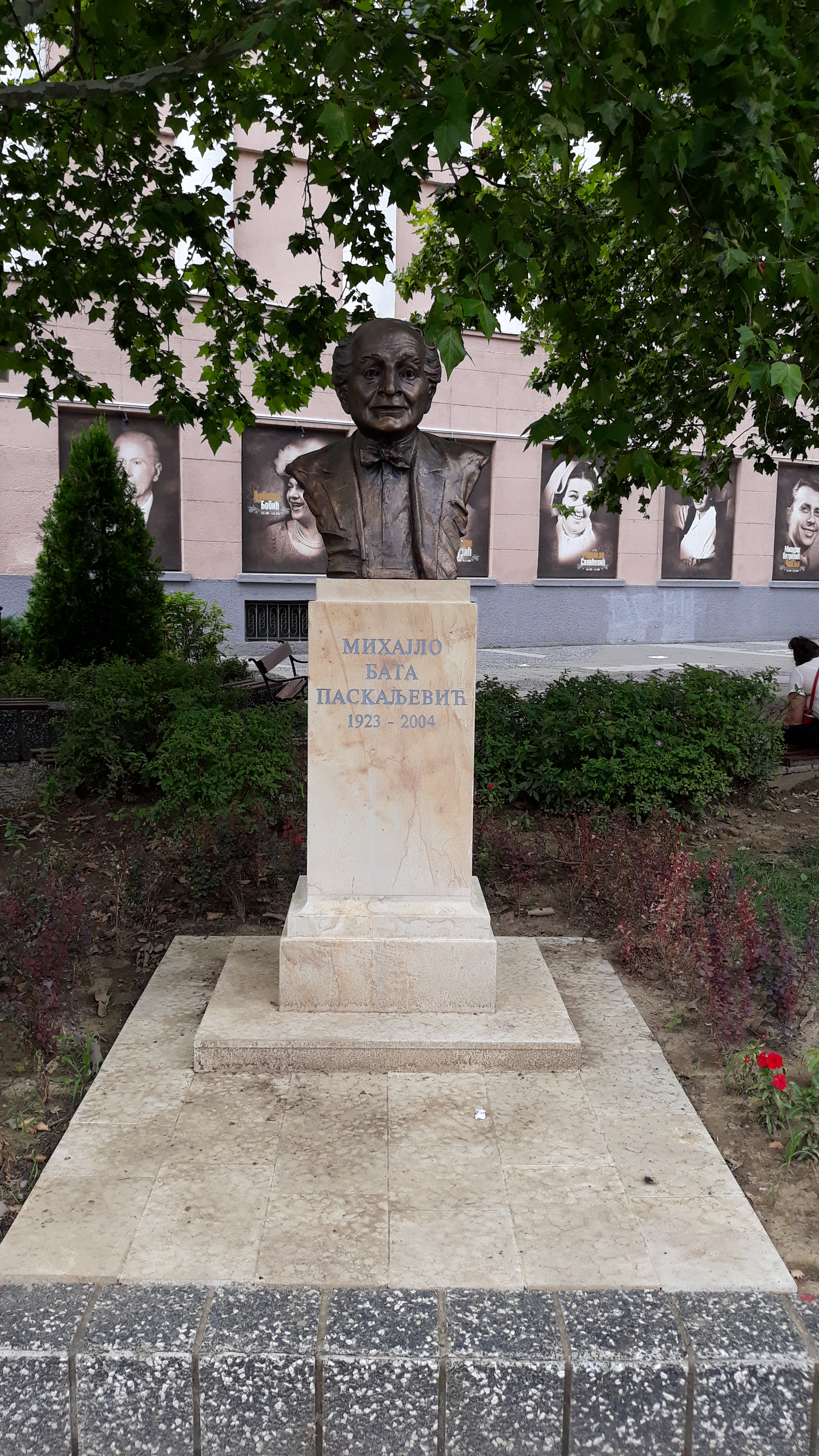 Бисте крушевачким глумцима испред зграде Културног центра у том граду.